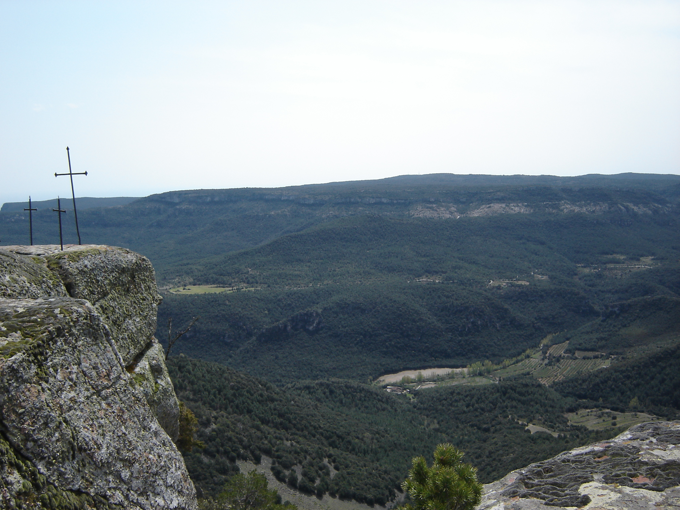 Les tres creus, a la mola d'estat, muntanyes de Catalunya